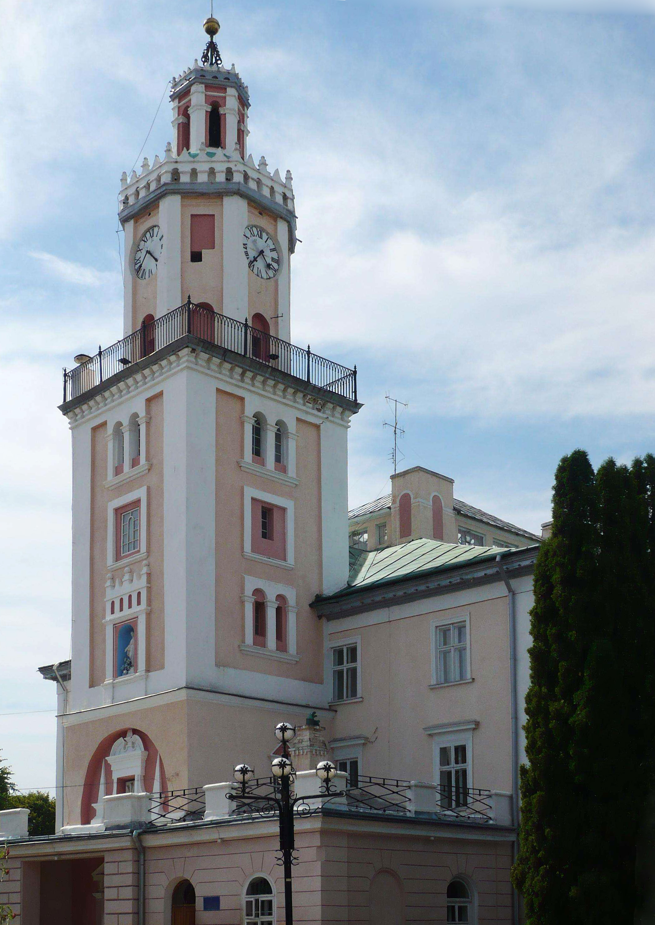 Ratusz w Samborze na Ukrainie